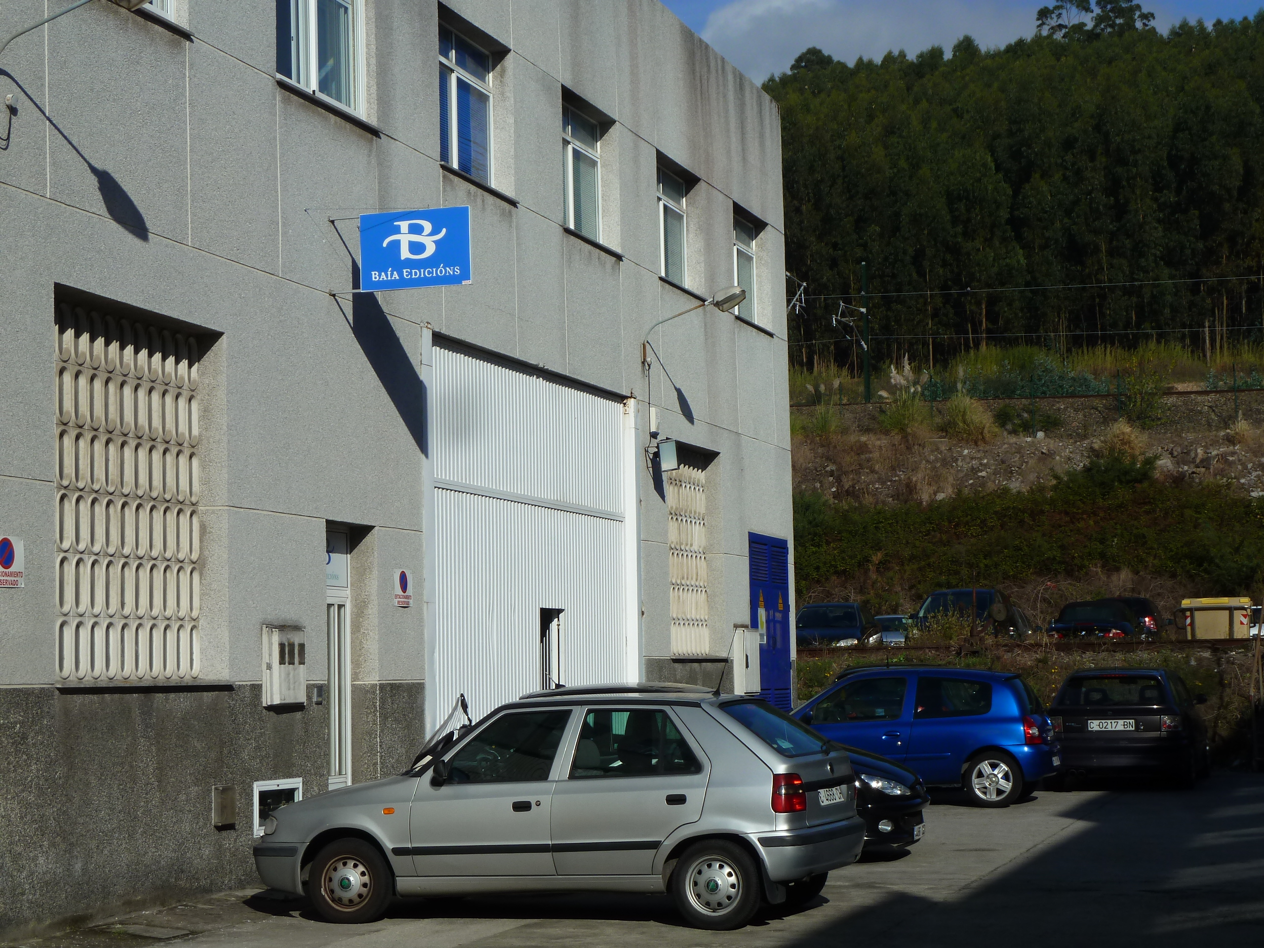 Ver título.